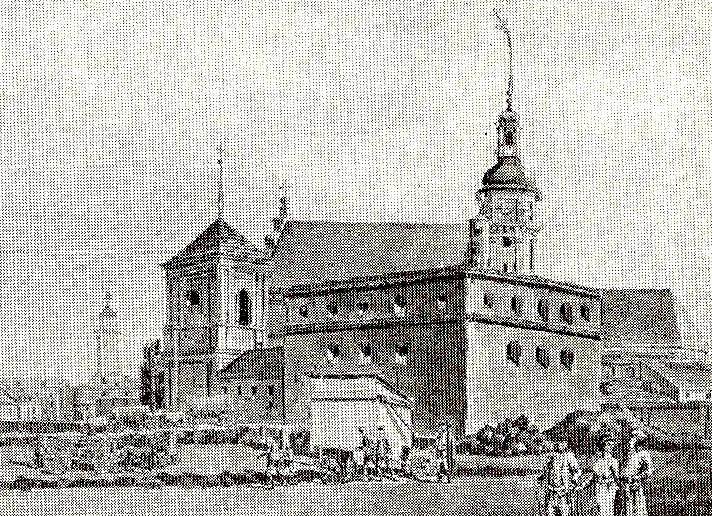 бернардинка: фортифікації кляштору бернардинців у львові